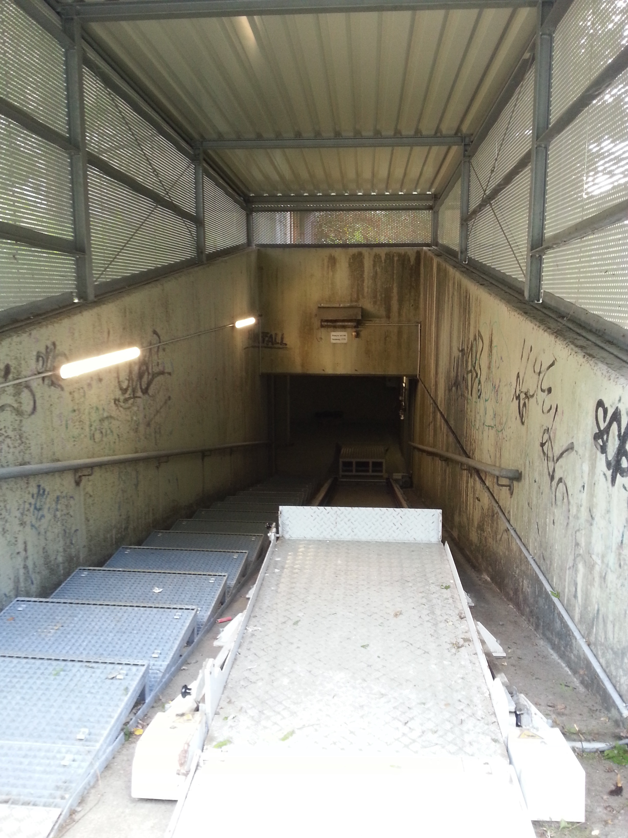 Der Offene Eingang des Hilfskrankenhauses in Oldenburg